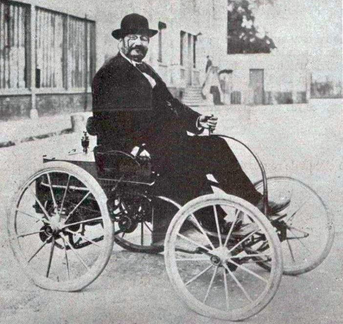 René Panhard en 1892, le Sport Universel Illustré du 25 juin 1926, n°1217, p.429